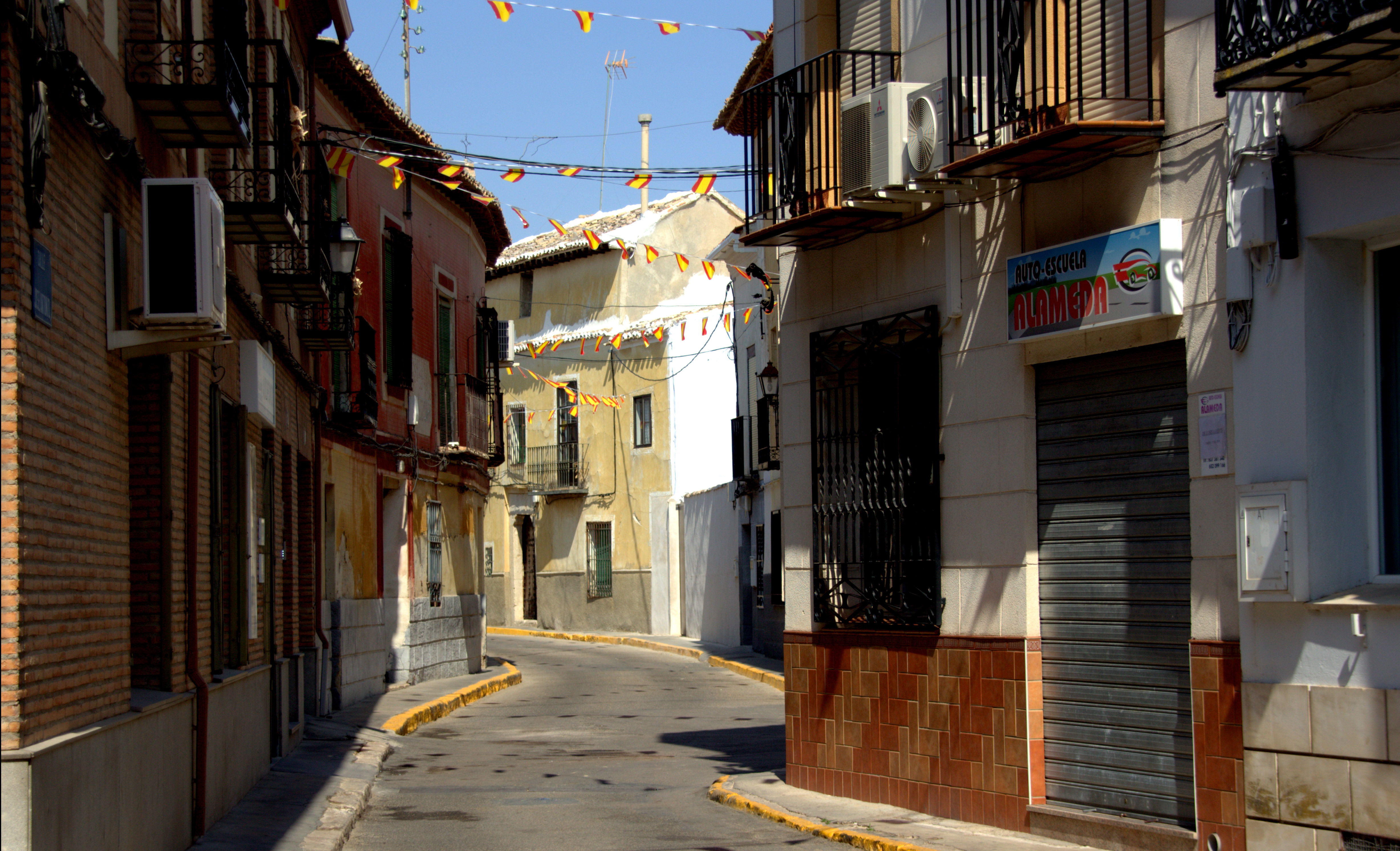 Yepes, provincia de Toledo (España).